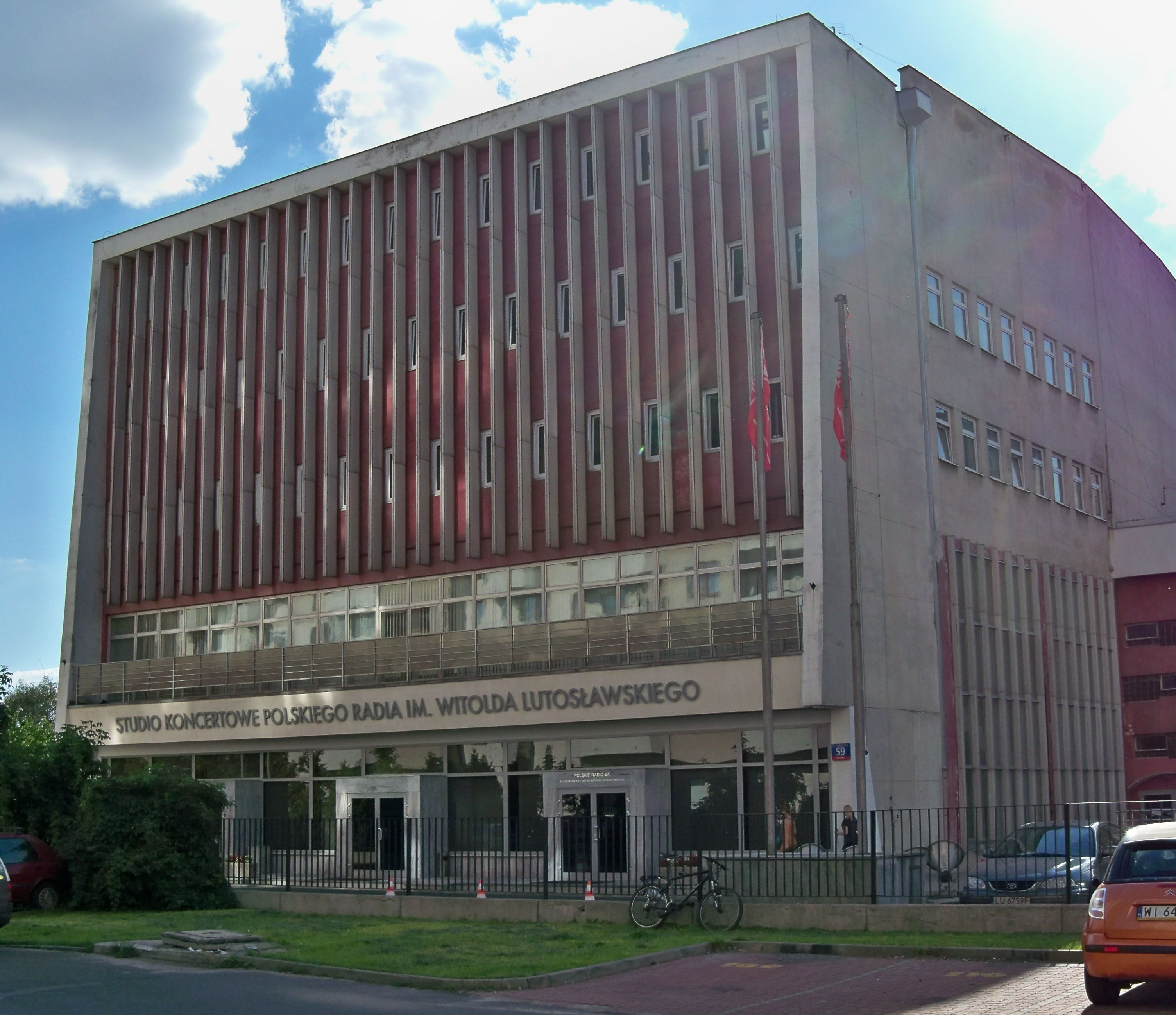 Studio Koncertowe im. Witolda Lutosławskiego Polskiego Radia. Warszawa, ul. Modzelewskiego 59